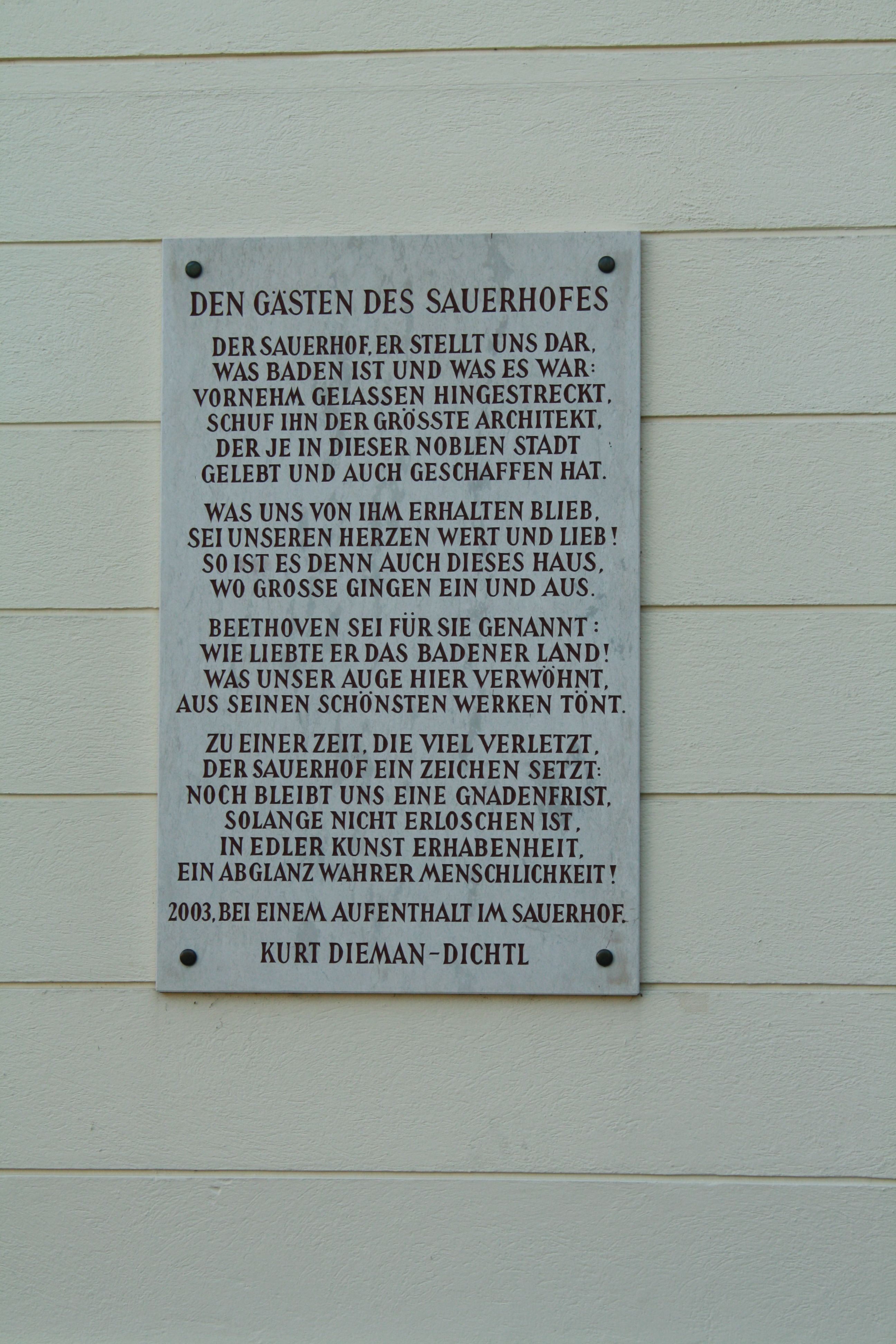 Tafel am Sauerhof in Baden in Niederösterreich